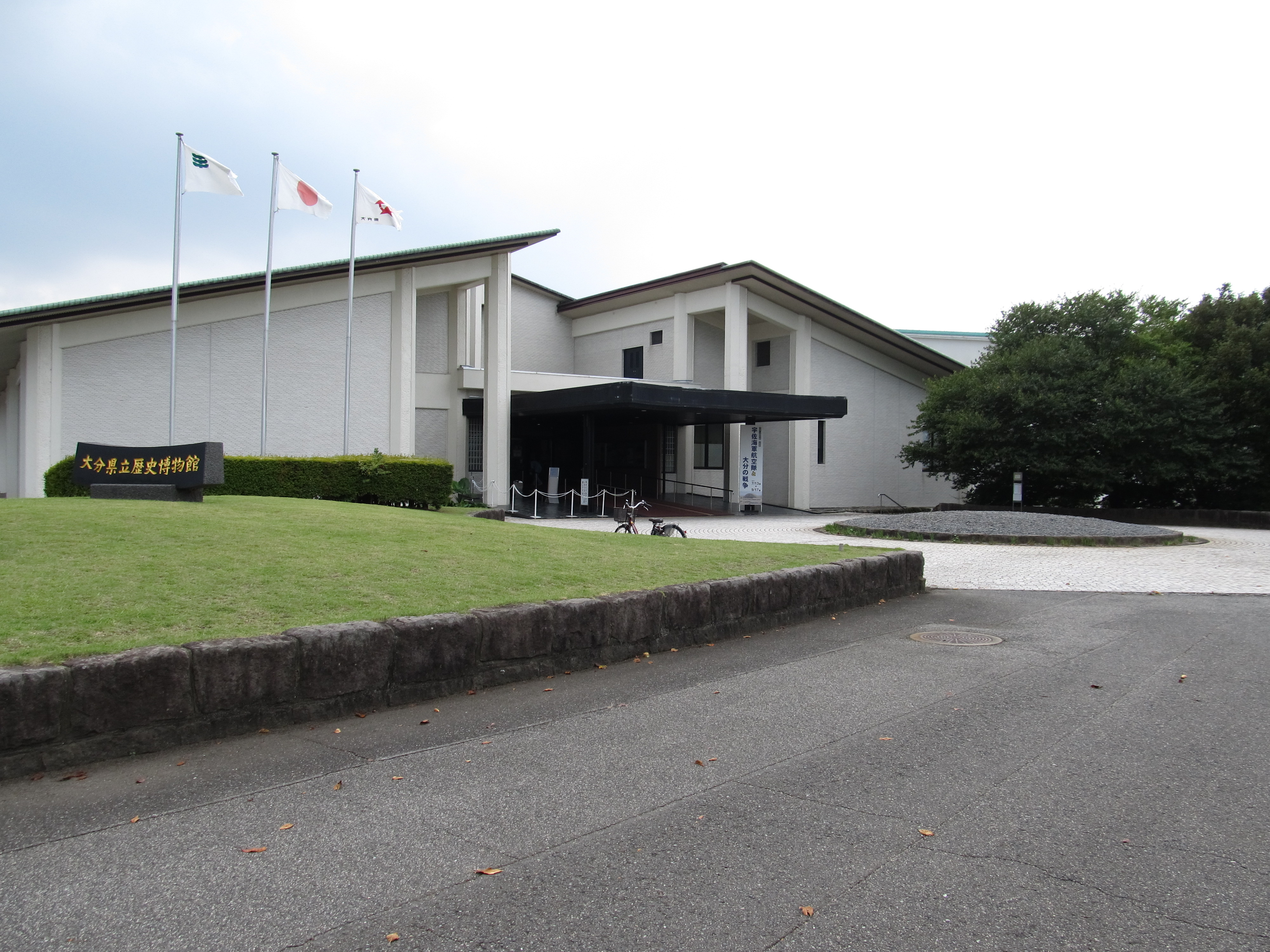 大分県宇佐市の宇佐風土記の丘内にある大分県立歴史博物館